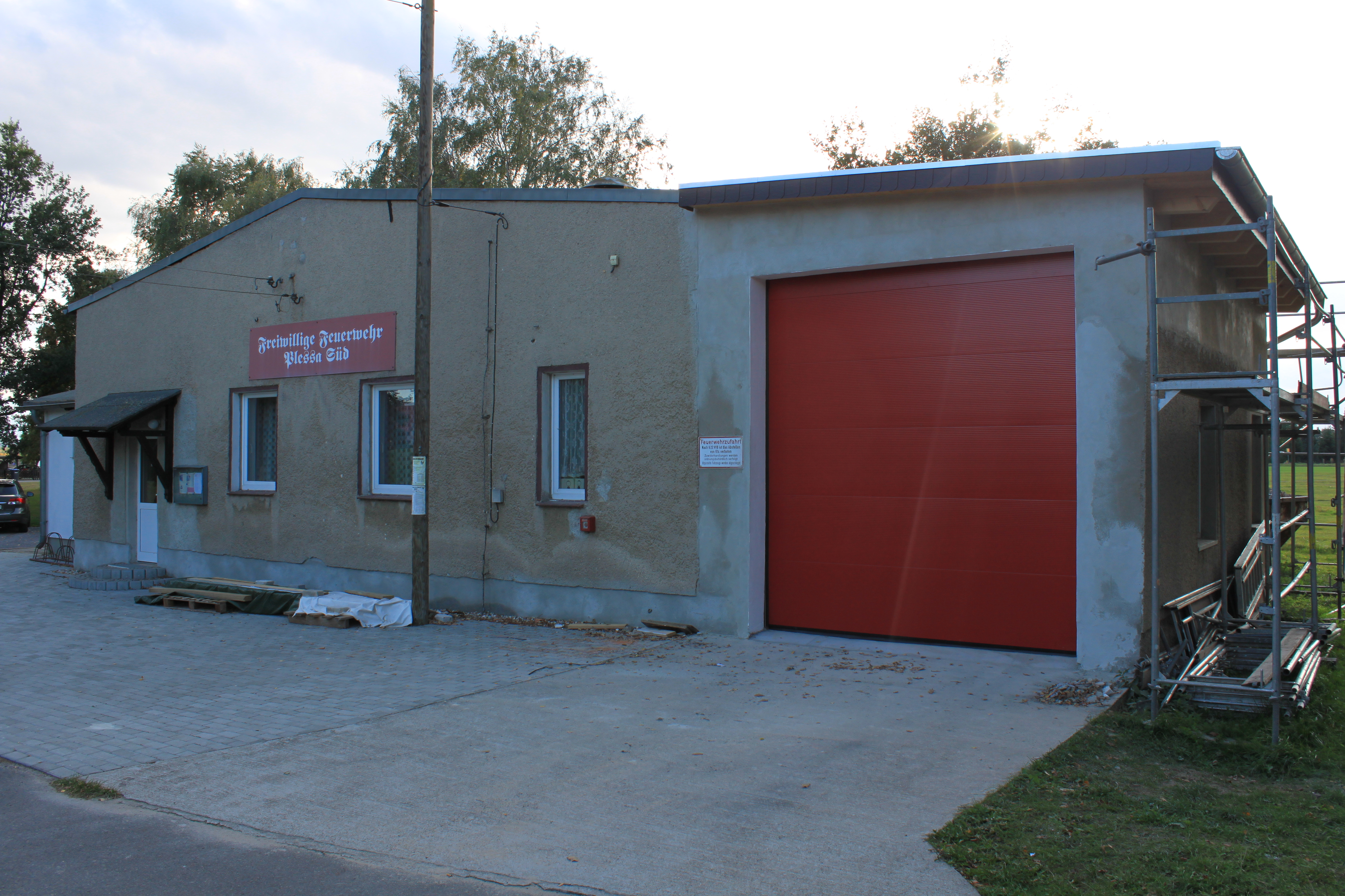 Gerätehaus